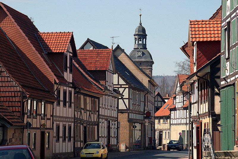 Blick in die Rathausstraße im historischen Ortskern Hedemündens